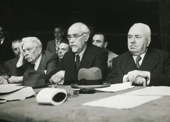 Vittorio Emanuele Orlando, Ivanoe Bonomi e Francesco Saverio Nitti siedono nei banchi dell'Assemblea Costituente